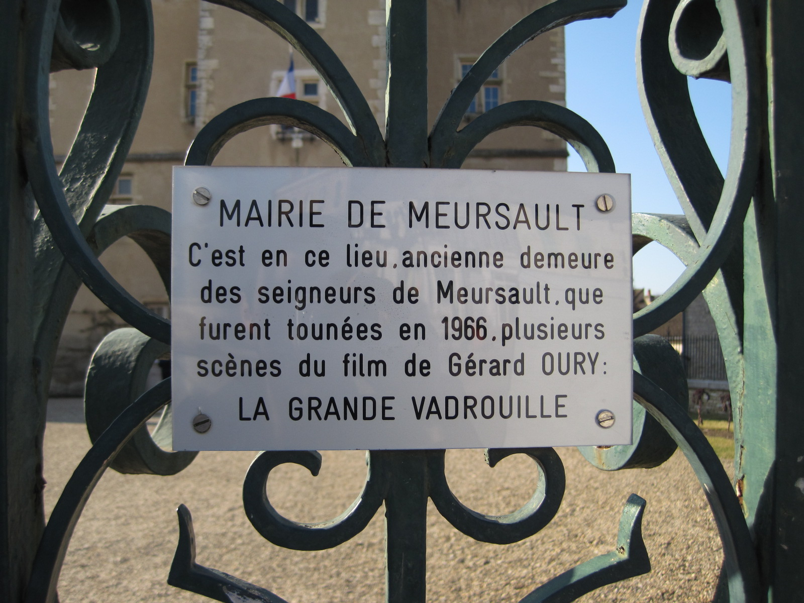 Ancien Château fort de Meursault actuelle Hôtel de Ville